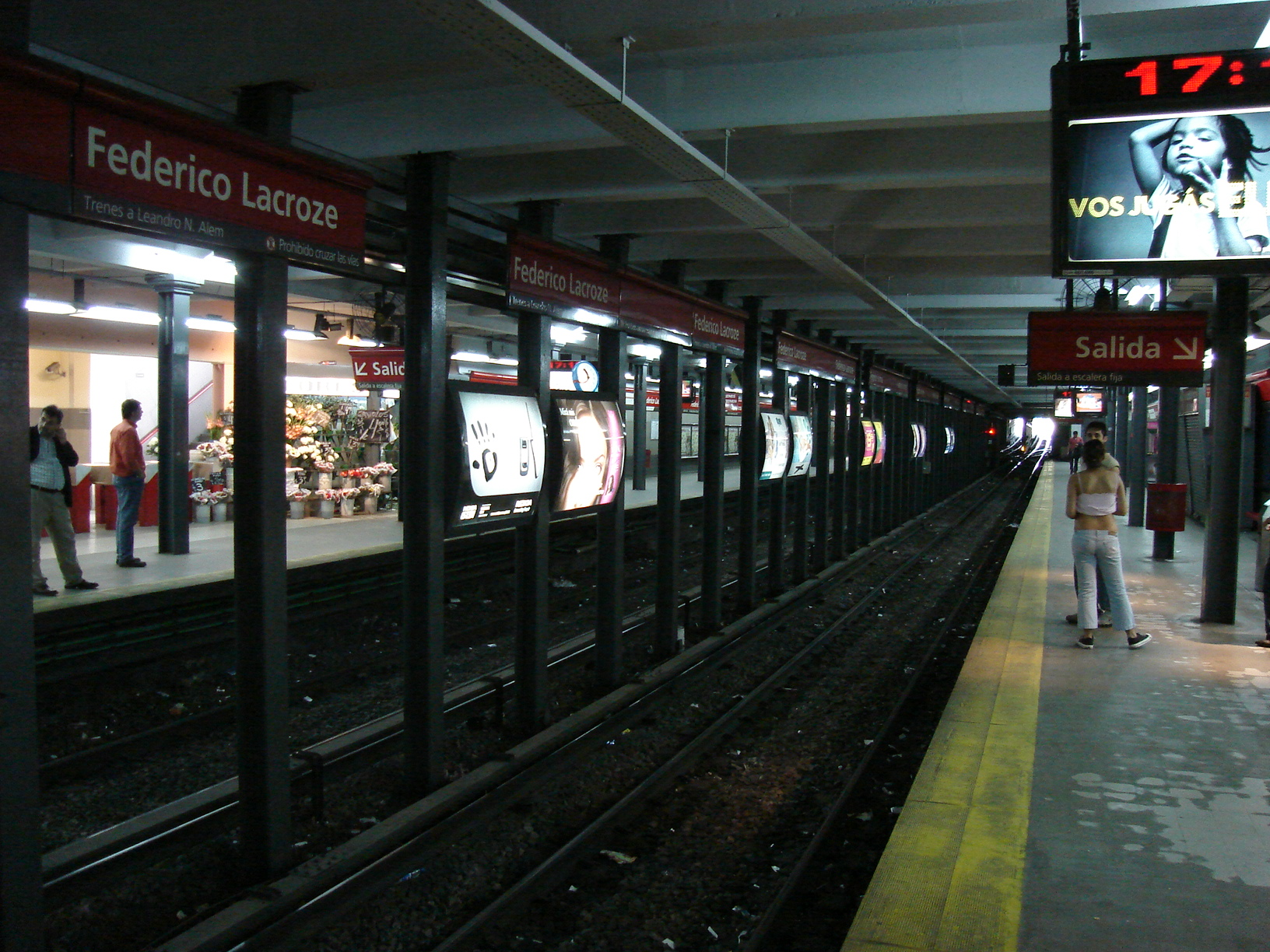 Anden a Leandro N. Alem de la estación Federico Lacroze de la linea B de subtes de Buenos Aires, Argentina.